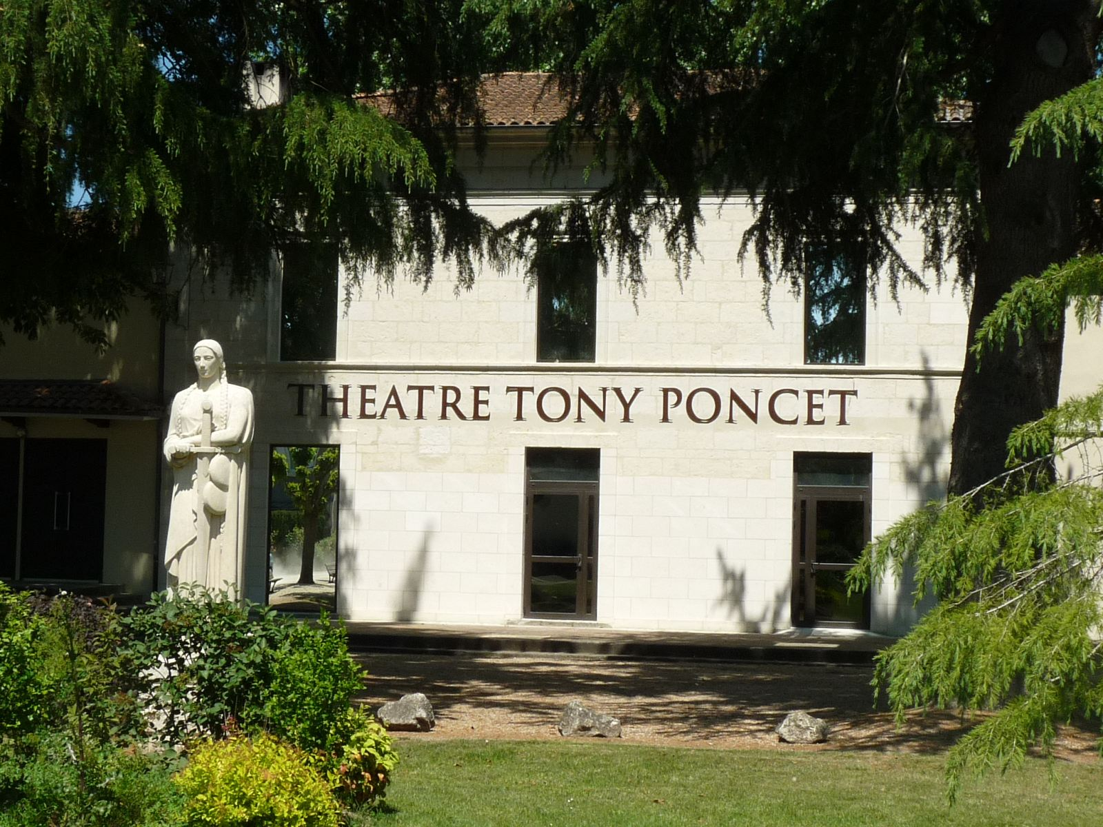 théâtre de St-Aigulin (Charente-Maritime, France)